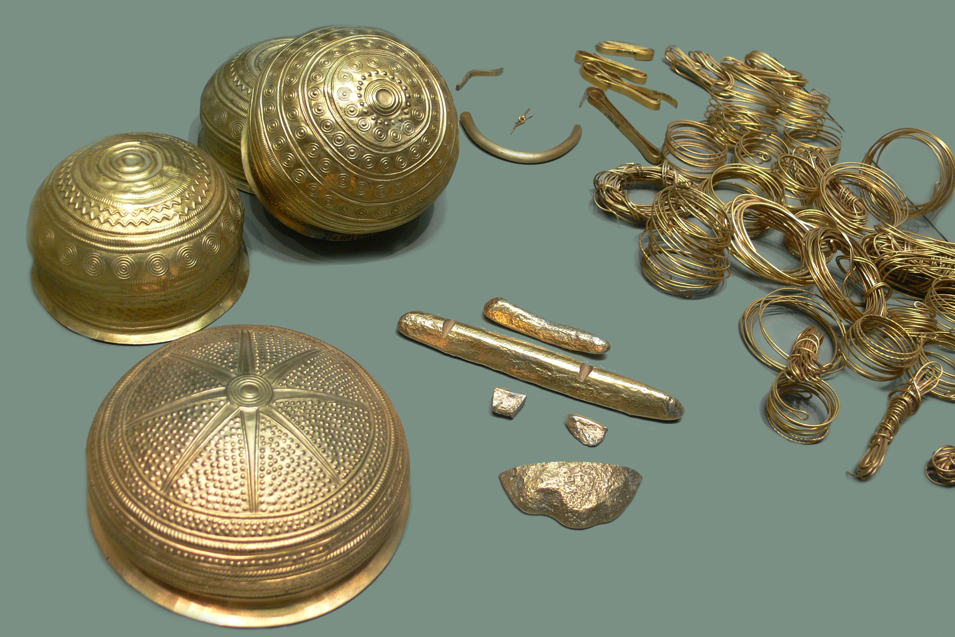 Der Goldfund von Eberswalde (bronzezeitlicher Goldschatz), 10.–9. Jh. v. Chr.; replica (the original was looted during World War II and is presently located at a museum in Moscow) Collection: Museum für Vor- und Frühgeschichte Berlin